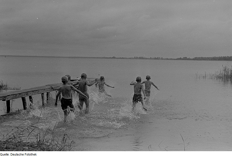 Original image description from the Deutsche Fotothek Badende Jungen